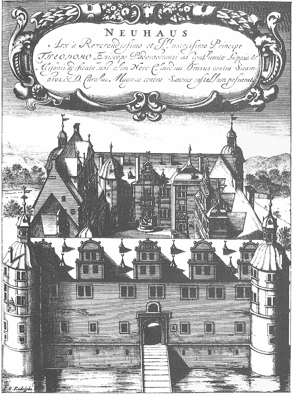 Fürstbischöfliches Schloss zu Neuhaus bei Paderborn